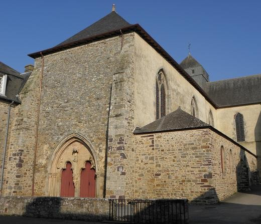 Façade occidentale de l'abbatiale Notre-Dame de Paimpont (35). This building is en partie classé, en partie inscrit au titre des Monuments Historiques. .